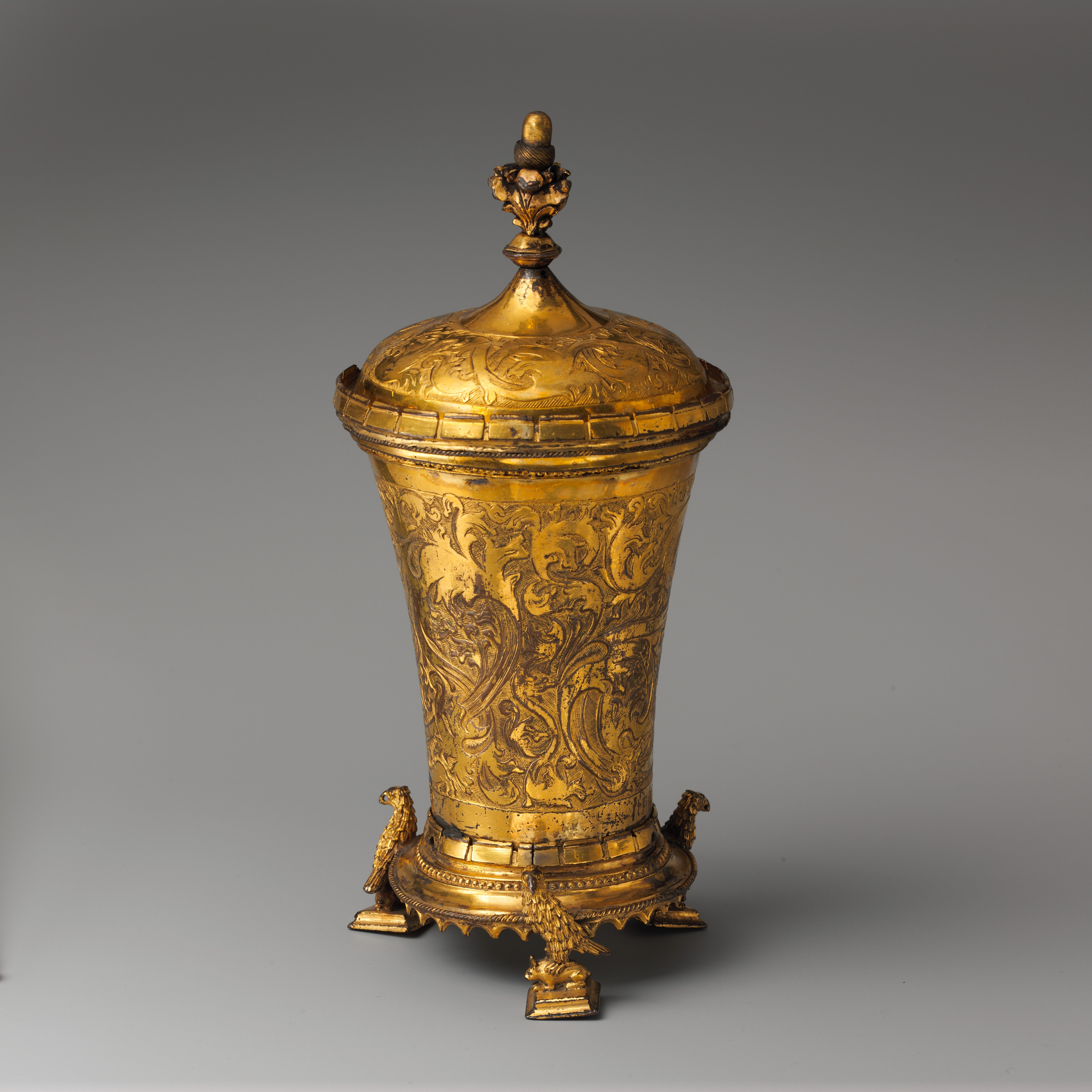 German; Beaker; Metalwork-Copper